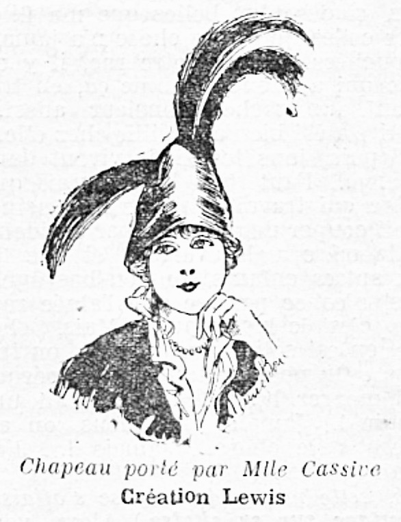 Dessin à la plume représentant l'actrice Armande Cassive coiffée d'un chapeau à plumes. Détail de : Extrait-Gil-Blas-04-12-1913.jpg